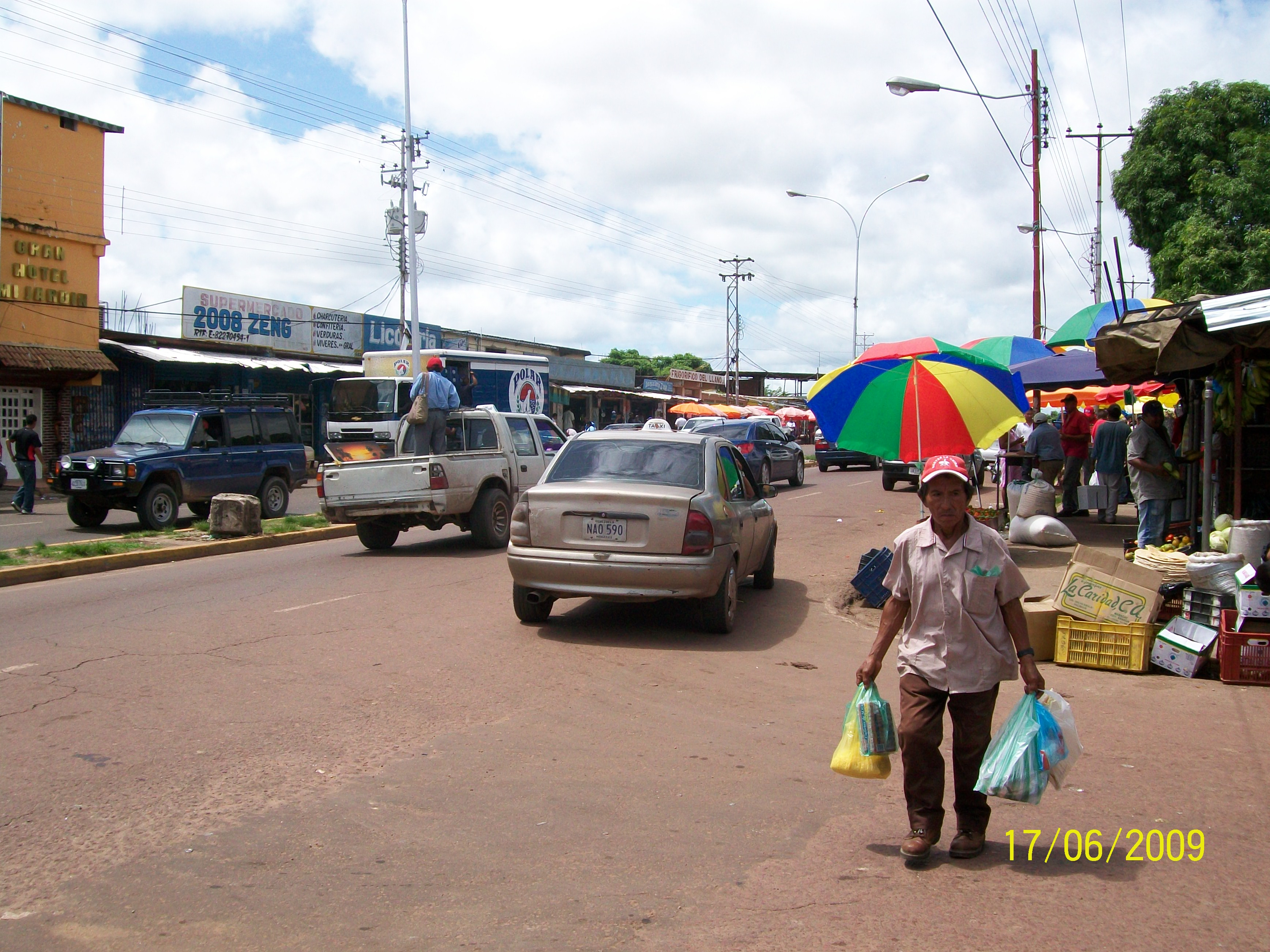 Mercado indígena conocido popularmente como el mercado del pescado, por su gran variedad de productos autóctonos entre los más famosos el pescado, y también el casabe y el mañoco hechos con la yuca; todos estos productos son traídos de todas las regiones del Amazonas y vendidos por todo tipo de etnias.